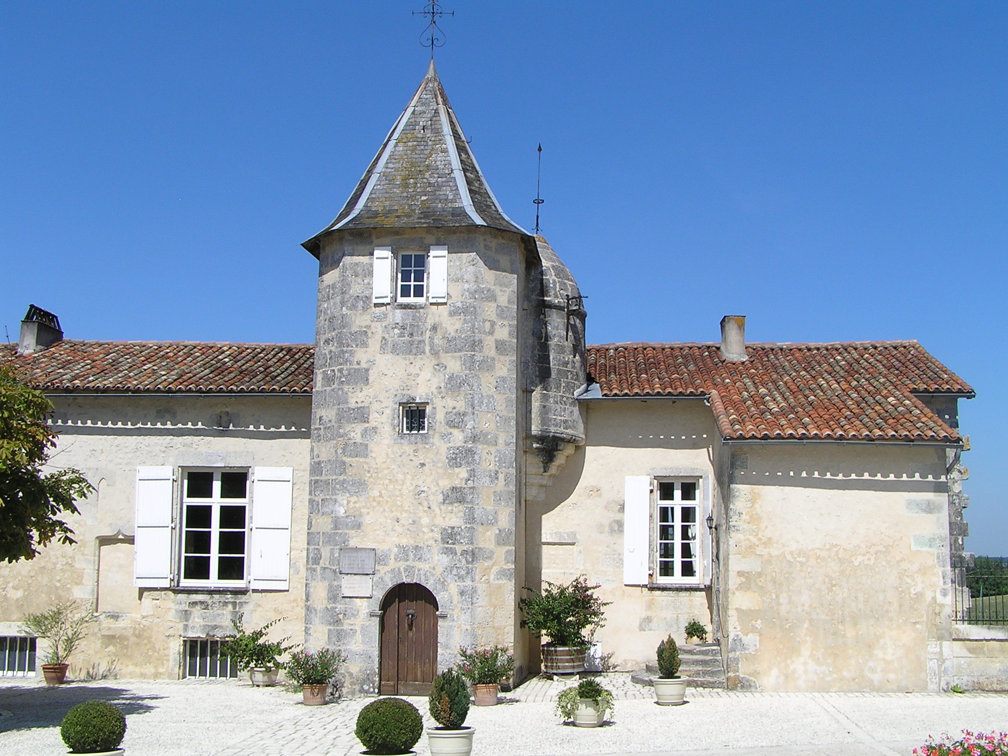 Le Maine-Giraud, manoir d'Alfred de Vigny à Champagne-Vigny